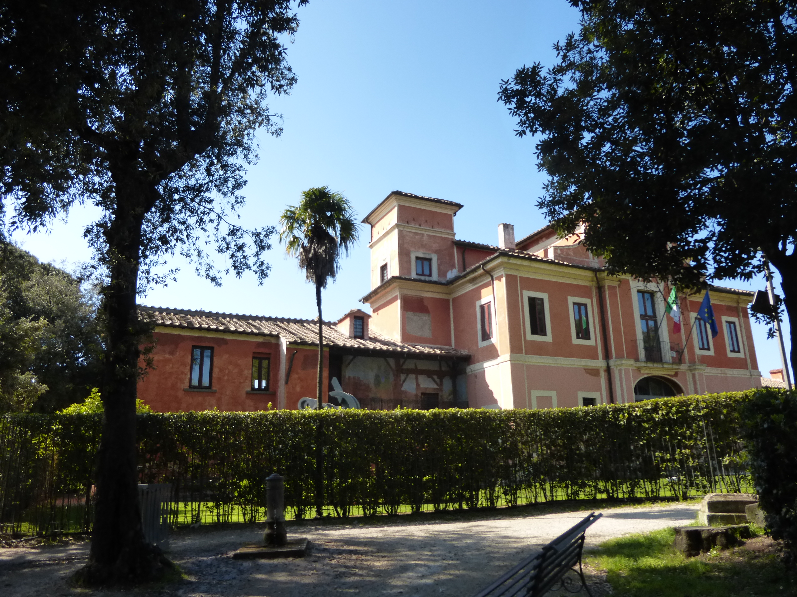 Roma, villa Carpegna, facciata.